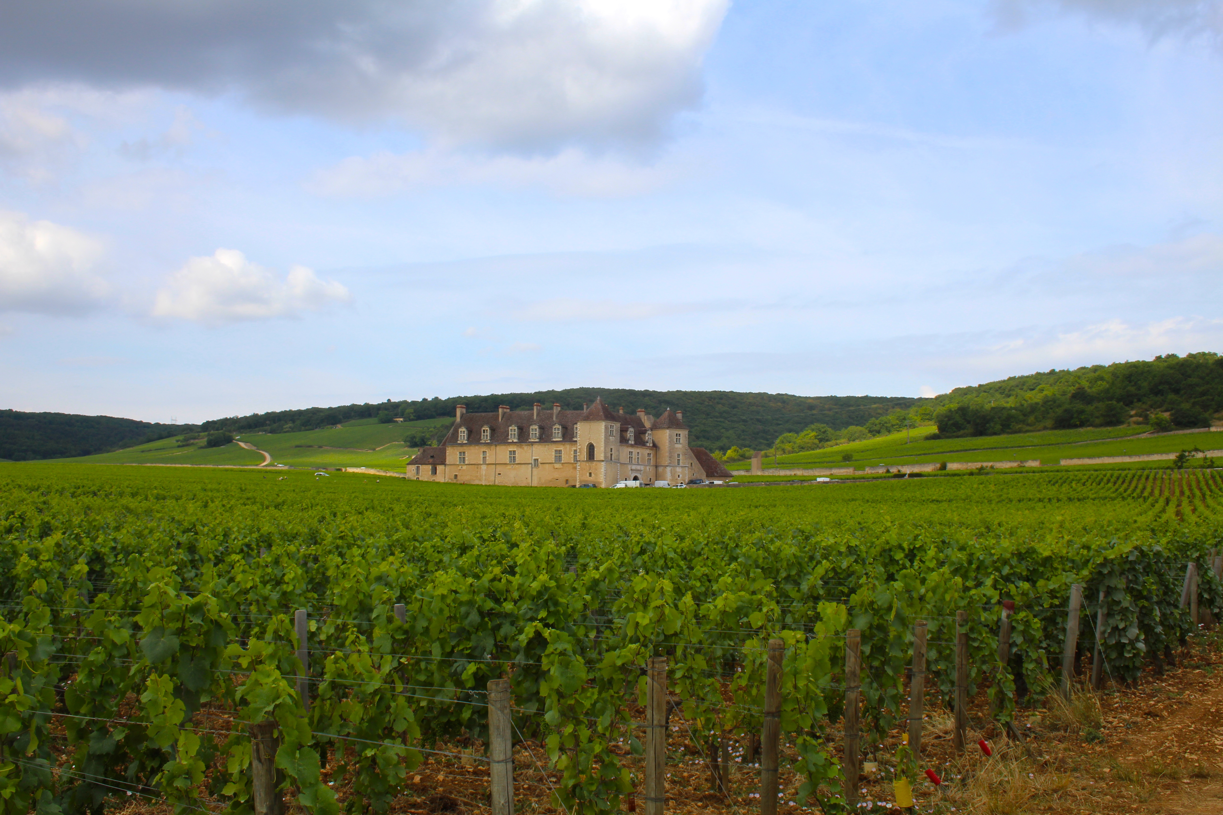 Chateau et Vignoble du Clos de Vougeot.jpg